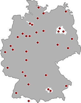 Die Verteilung der Lacrosseteams in Deutschland.